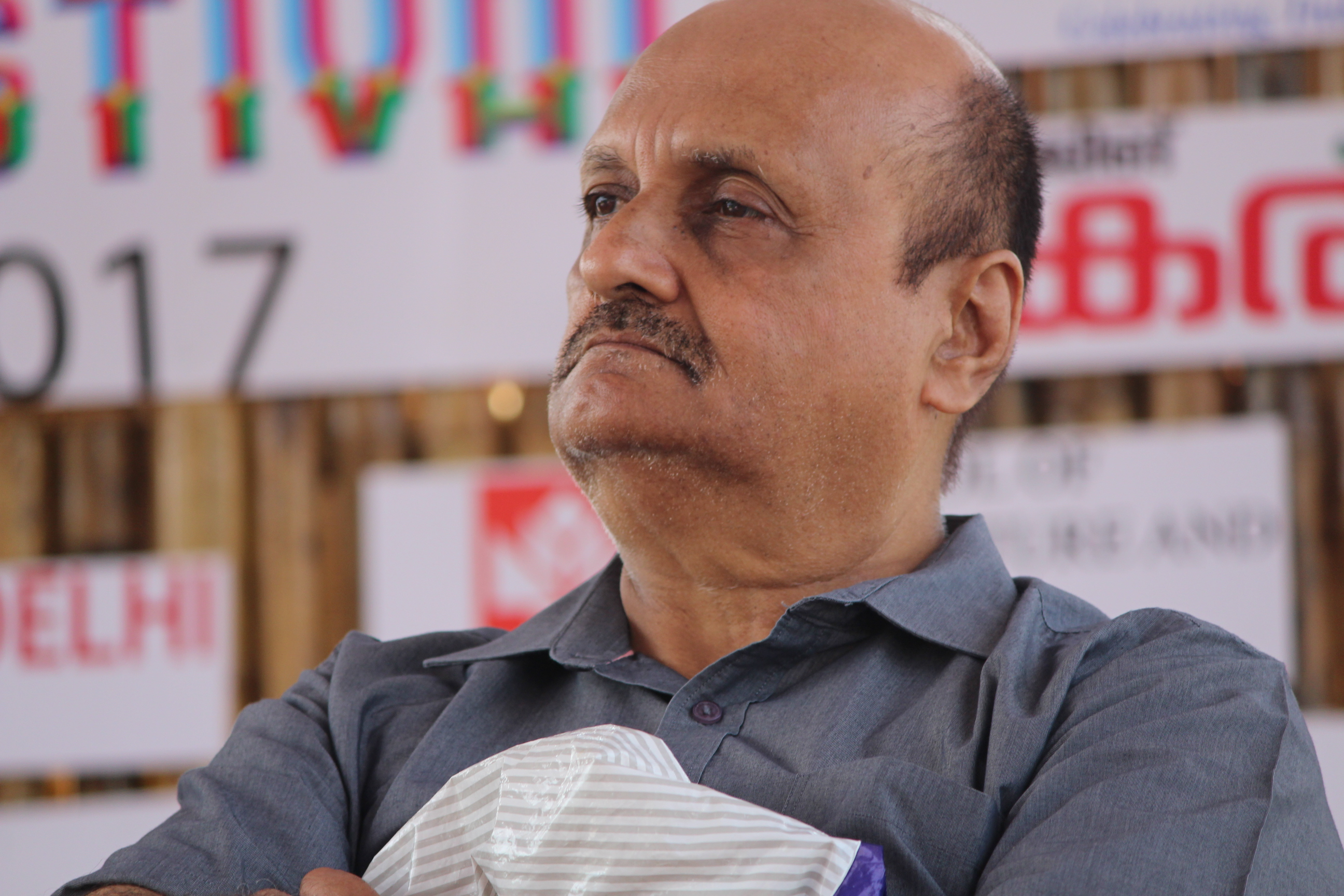 2017 ഫെബ്രുവരിയില്‍ കോഴിക്കോട്ടുവച്ചുനടന്ന കേരളാ ലിറ്ററേച്ചര്‍ ഫെസ്റ്റിവലില്‍